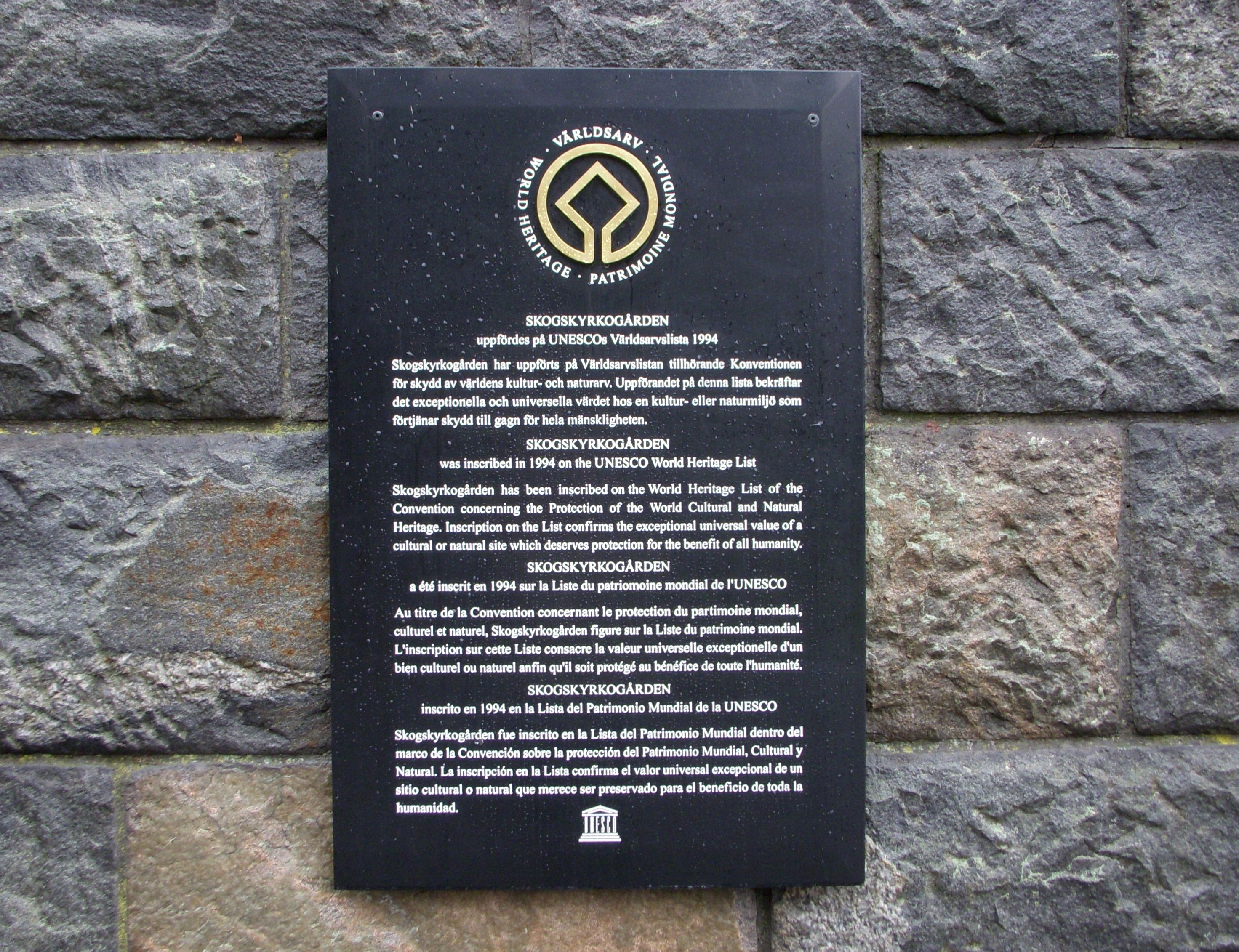 Informationstavla vid huvudentrén till Skogskyrkogården i Stockholm